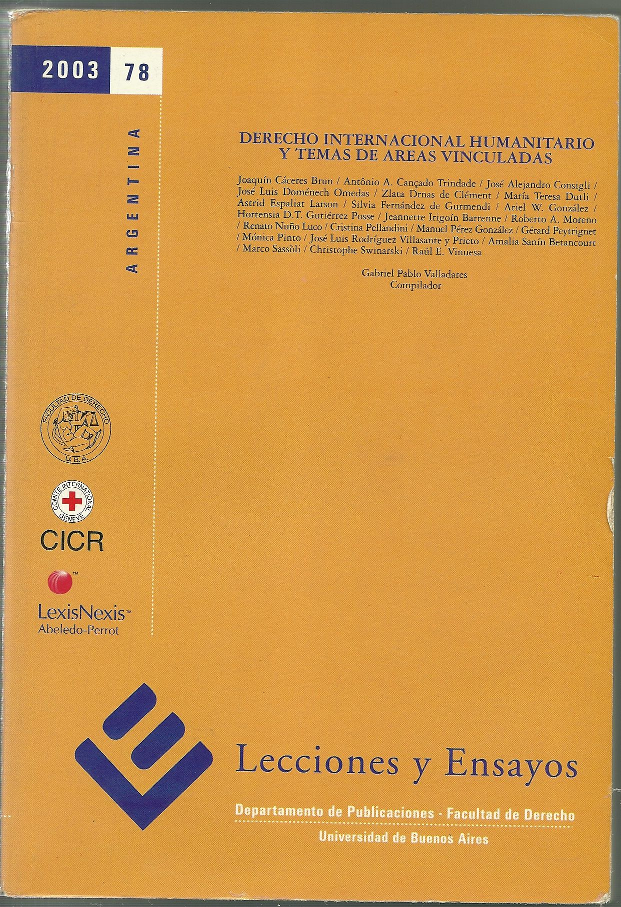 Tapa del número 78 de la Revista Lecciones y Ensayos.